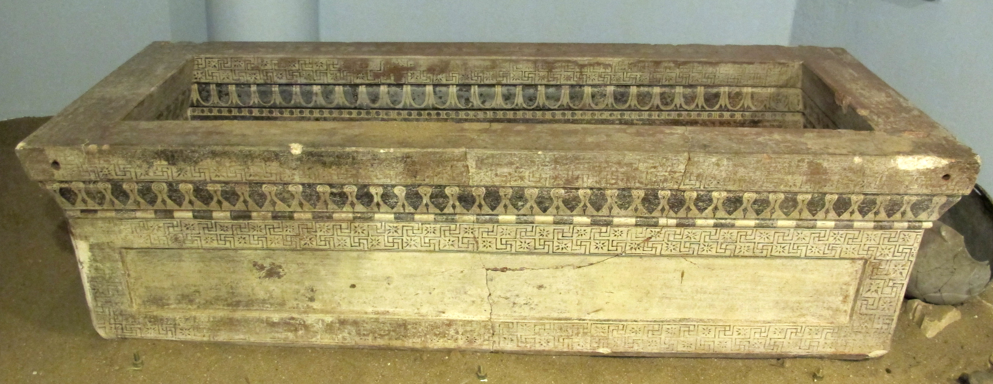 Sarcofagi di clazomenae